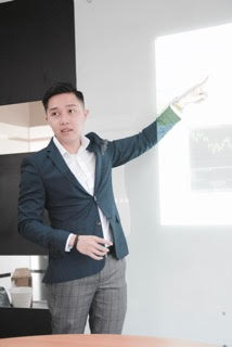 Andika Sutoro Putra membagi ilmu mengenai investasi dalam sebuah seminar di Jakarta